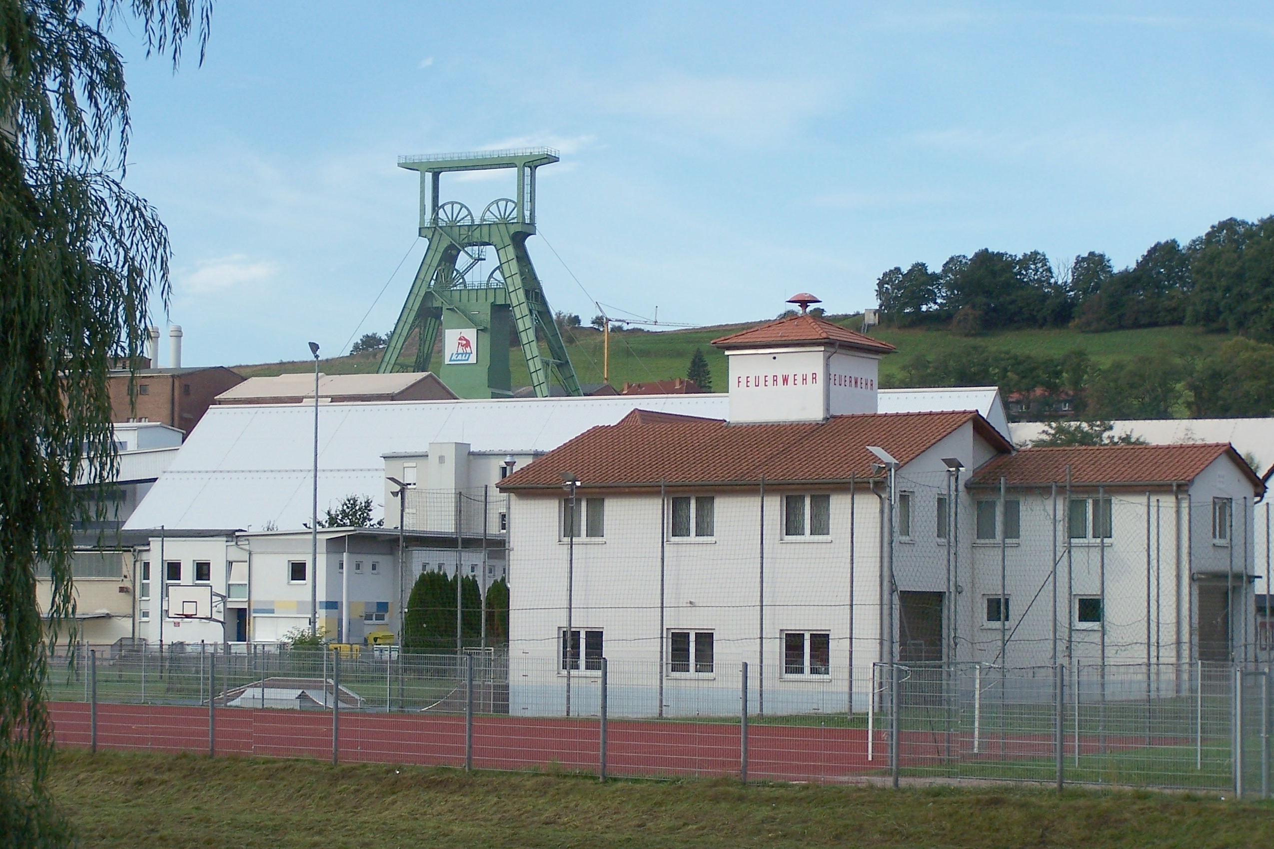 Unterbreizbach